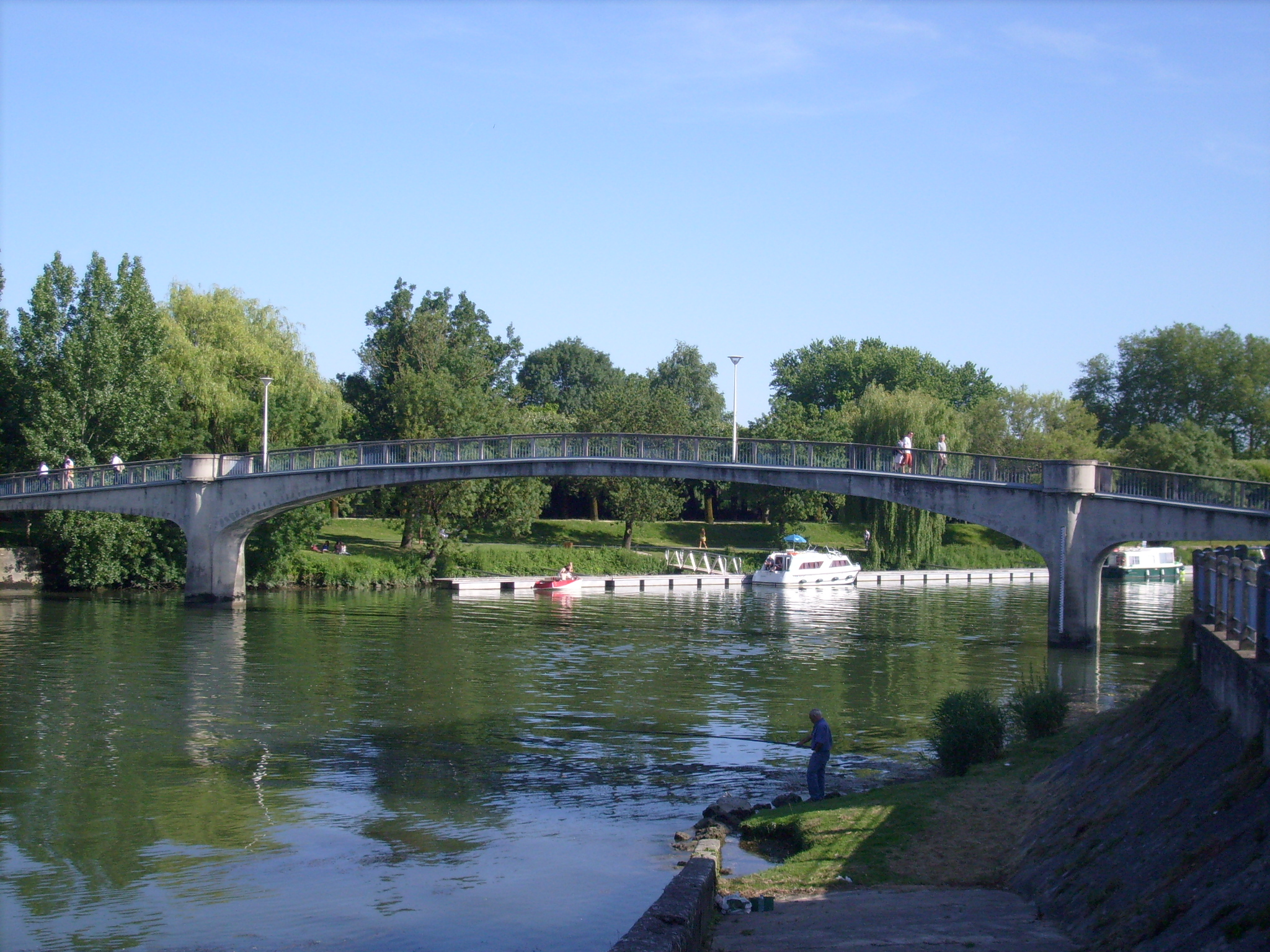 Passerelle du jardin public à Saintes